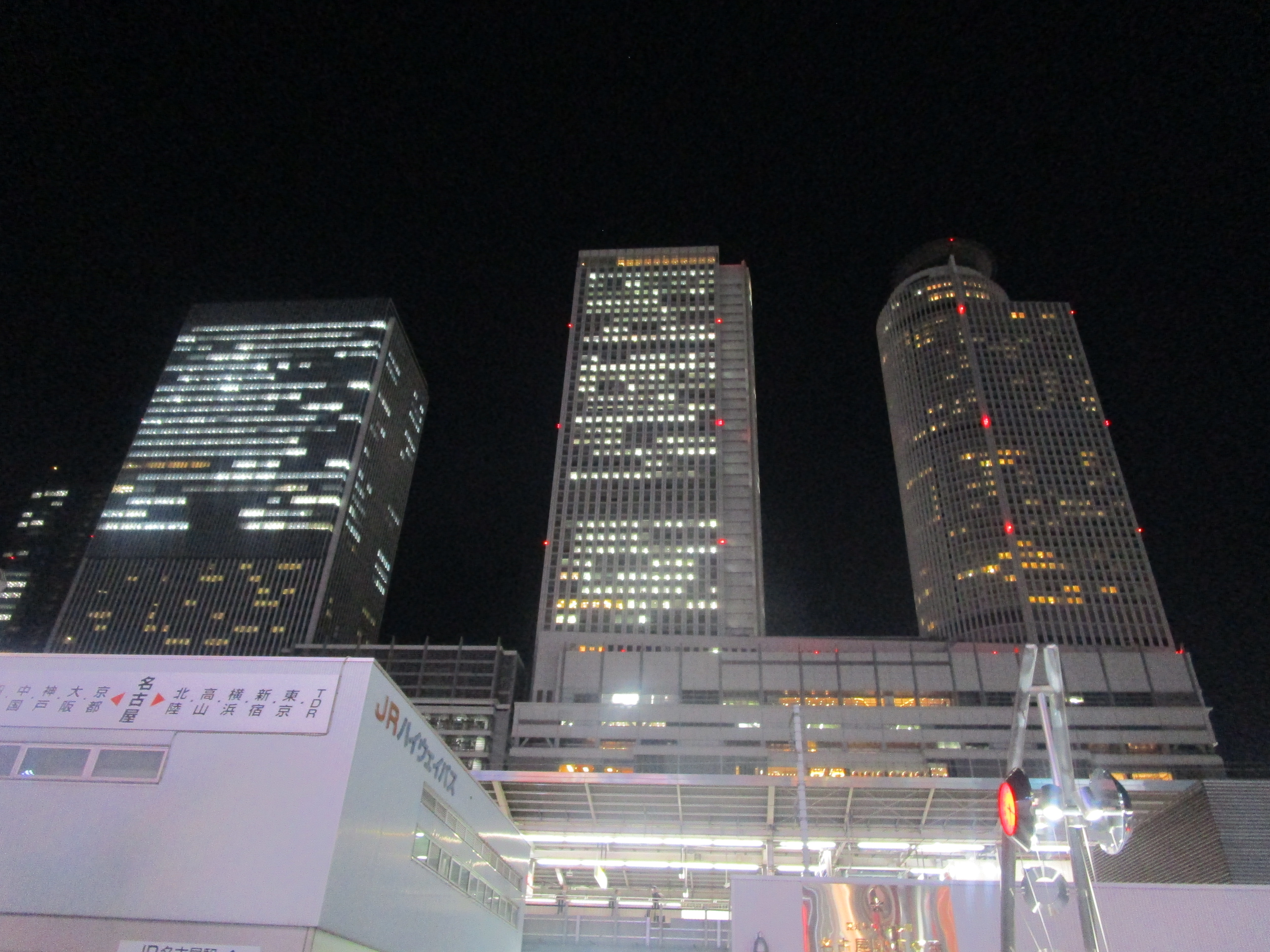 名古屋駅の太閤通口から撮影したJRセントラルタワーズ